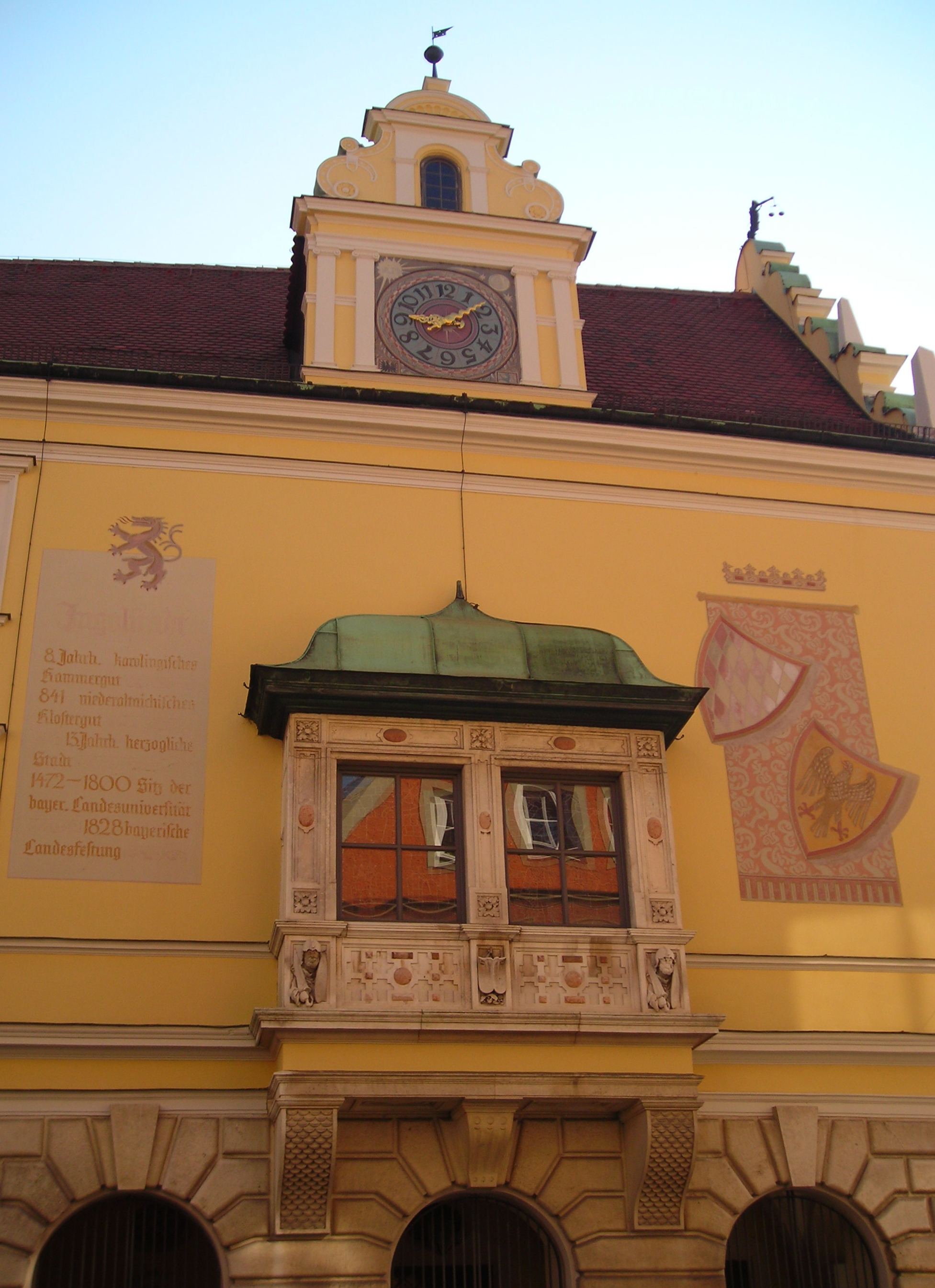 Altes Rathaus Ingolstadt